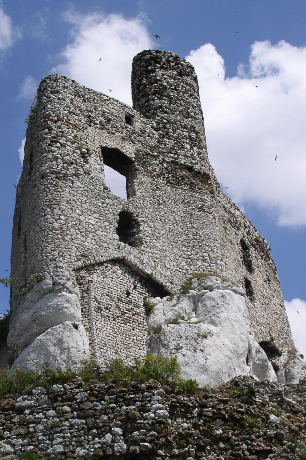 Mirów Castle